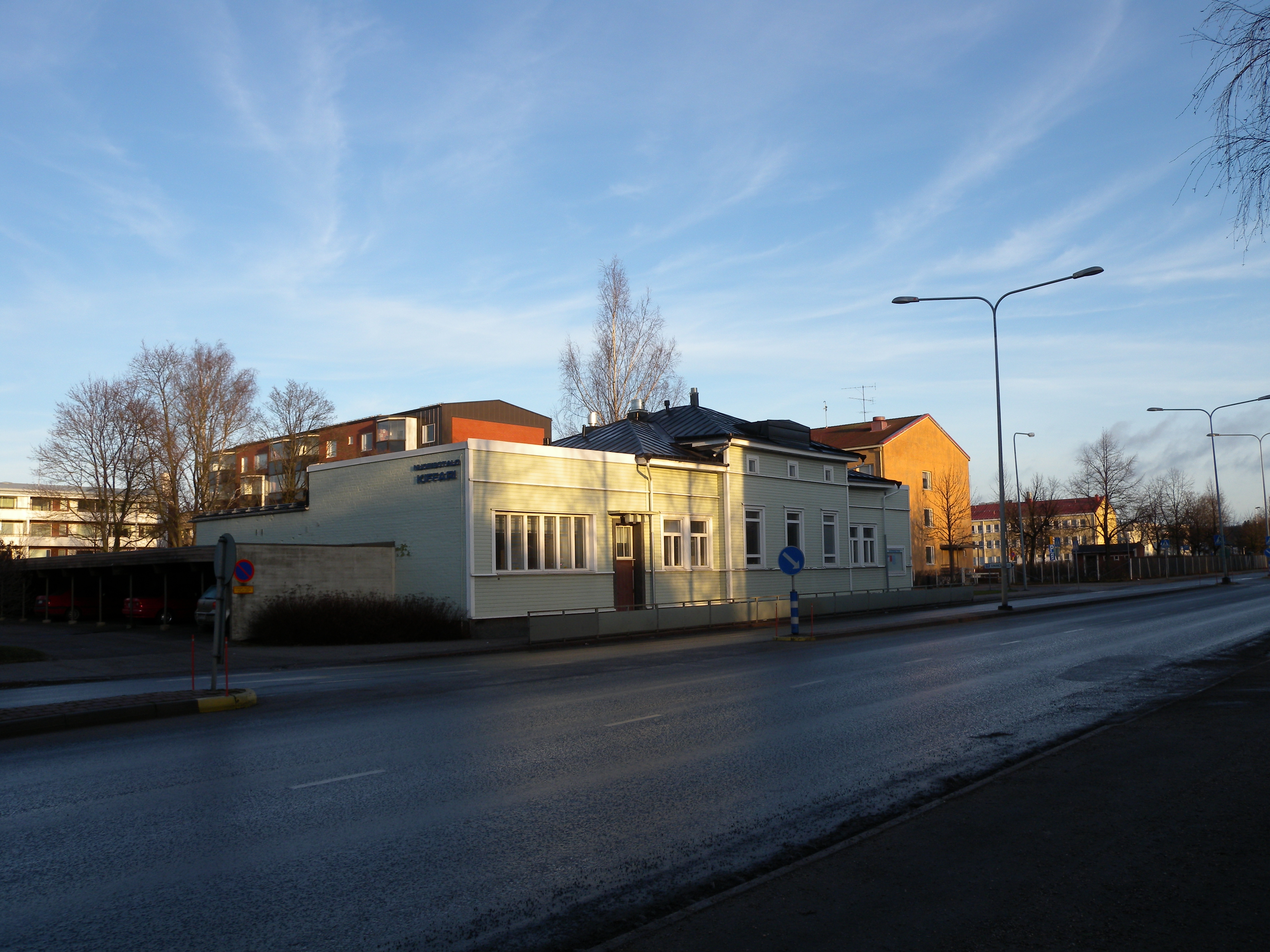 Kiffari raatihuoneenkatu 2